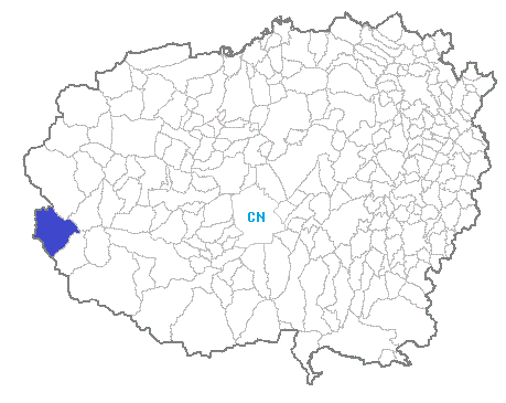 Posizione del comune nella provincia di Cuneo